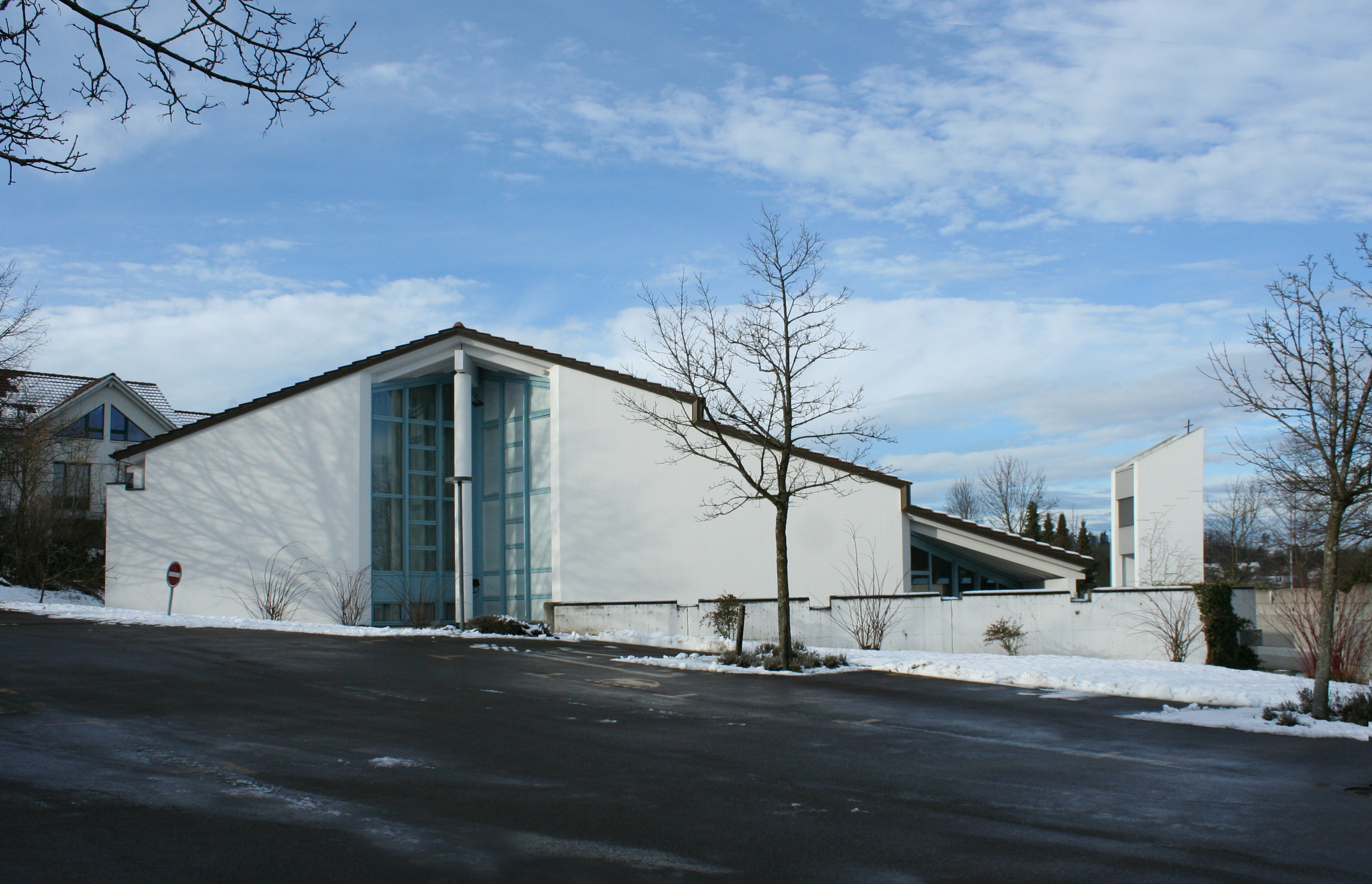 Römisch-katholische Kirche St. Franziskus Maur-Ebmatingen, Aussenansicht